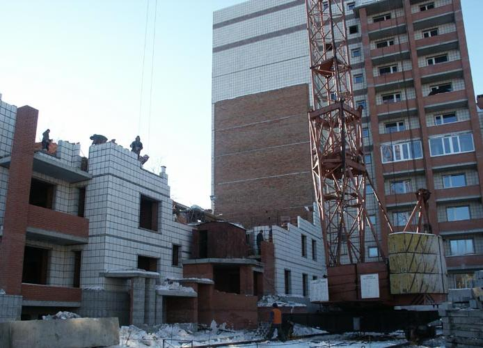 Кран КБ-403 на строительстве дома переменной этажности по ул_Ватутина 20_1 - Новосибирск